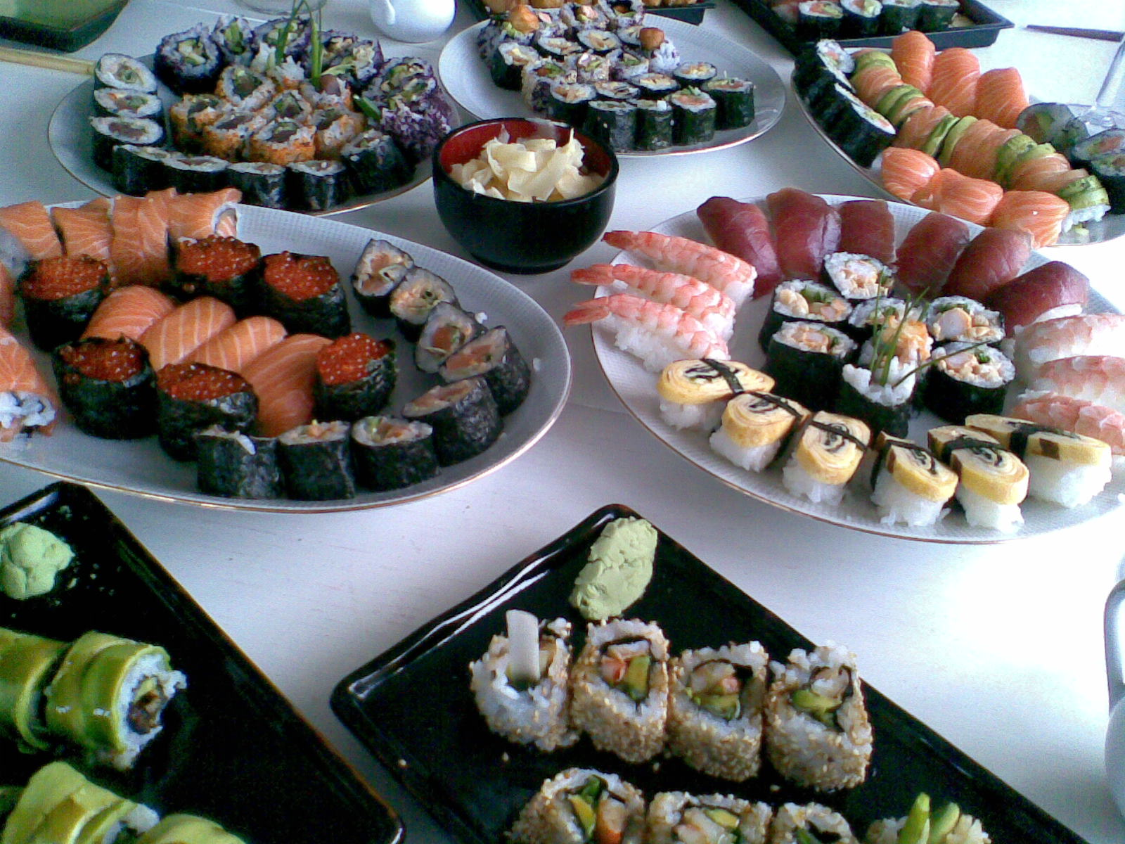 Sushi